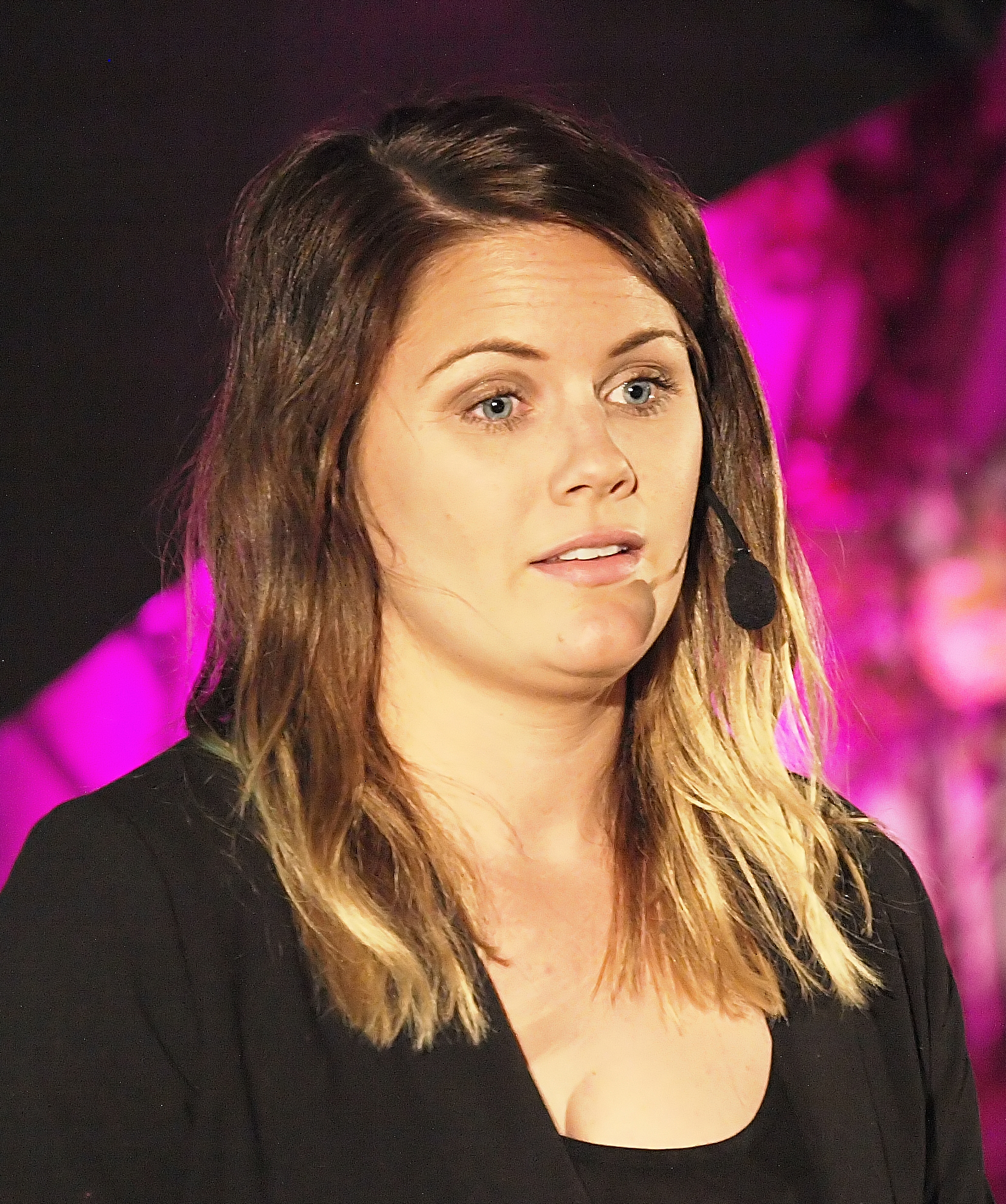 Julia Mjörnstedt, TEDx, Almedalen 2012